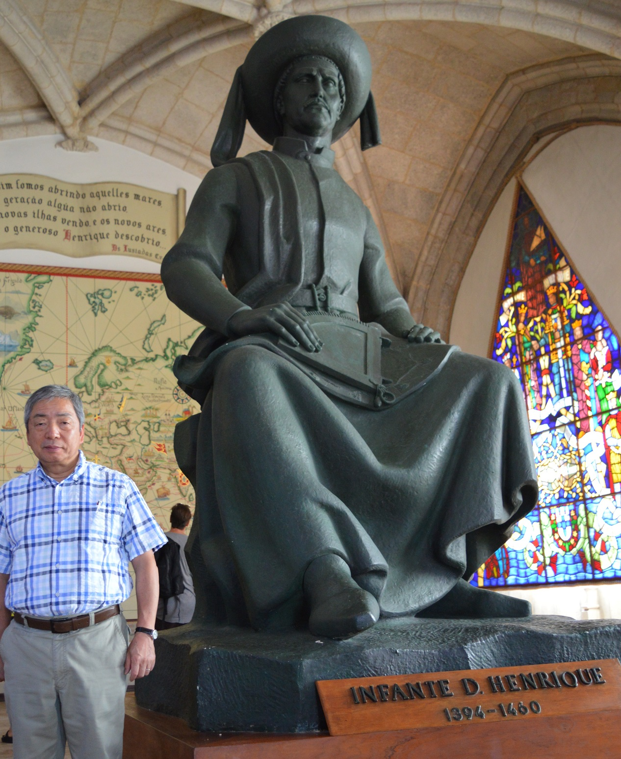 エンリケ航海王子像 リスボン海軍博物館